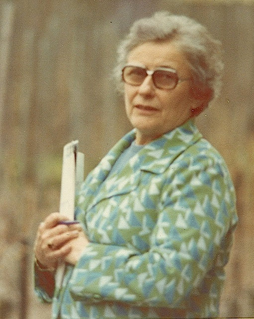 Nelly Heer, Vizedirektorin an der Kantonsschule Küsnacht, 1973